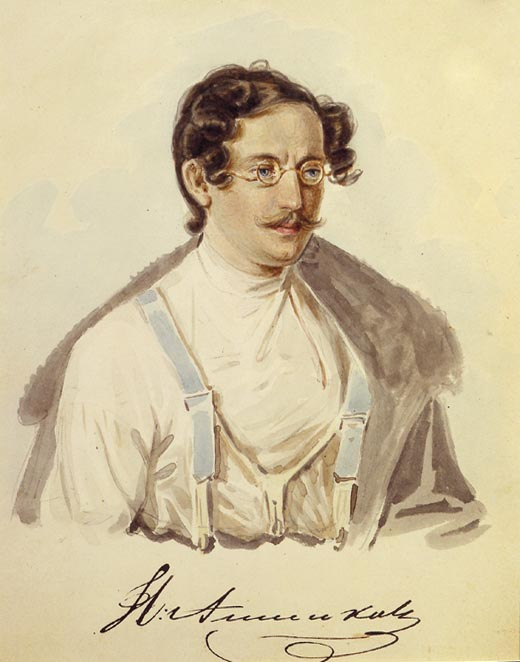 Ива́н Алекса́ндрович А́нненков (1802-1878)- декабрист